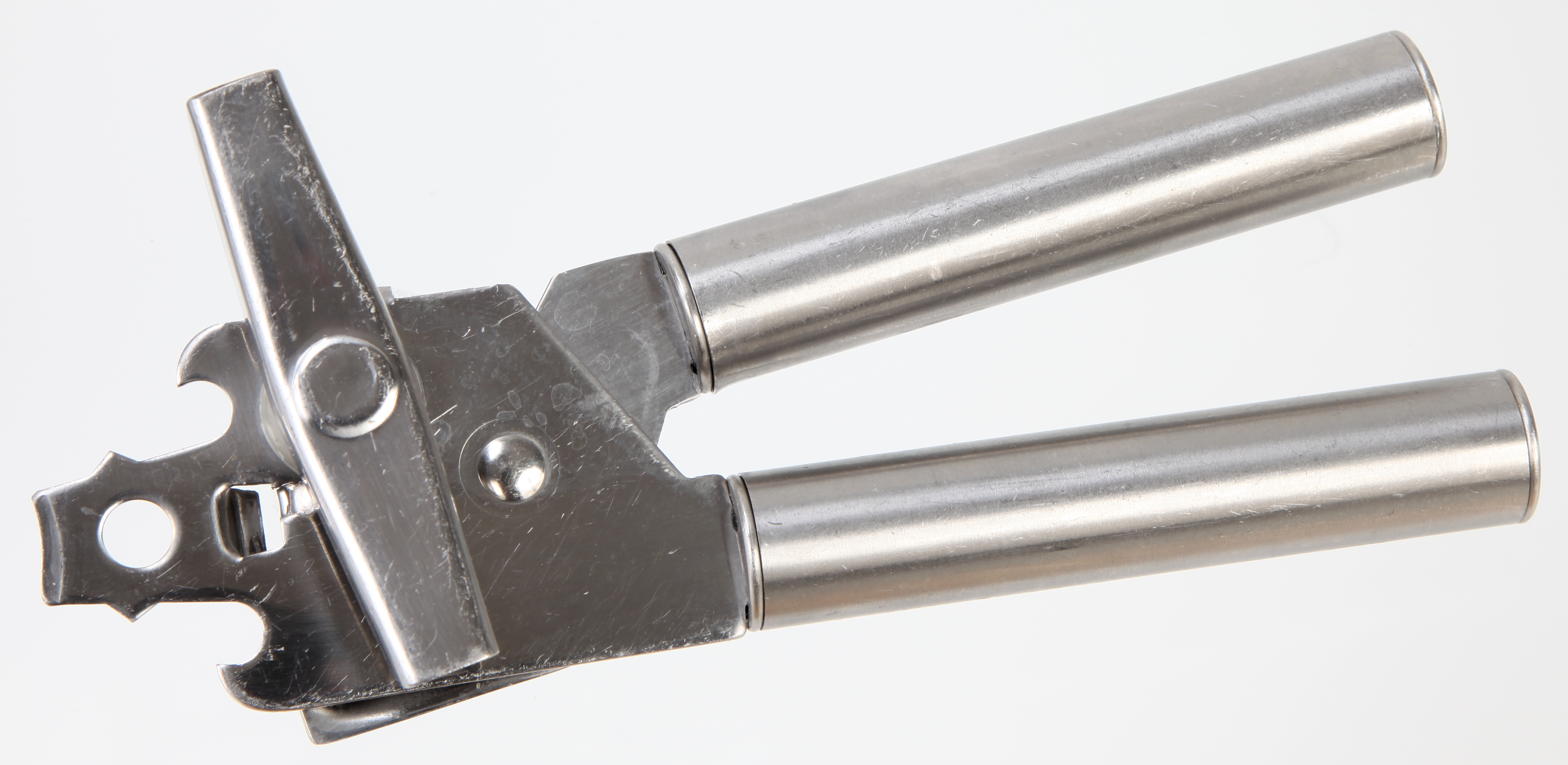 Dosenöffner